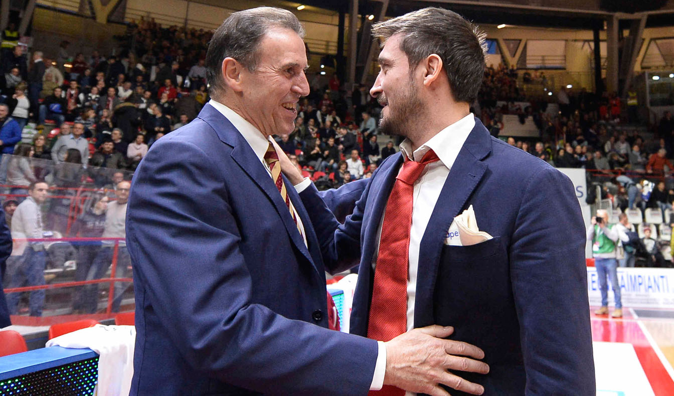 Immagine rilasciata dal proprietario della stessa, pallacanestro Varese